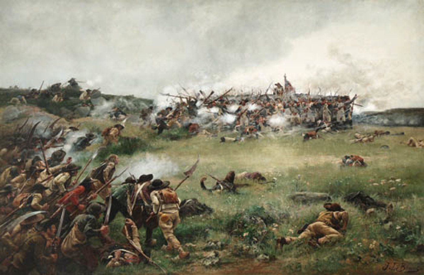 "Le Bataillon Carré, Affaire de Fougères 1793 " Painting hanging at present in the Lee Library at Brigham Young University. Provo, Utah.